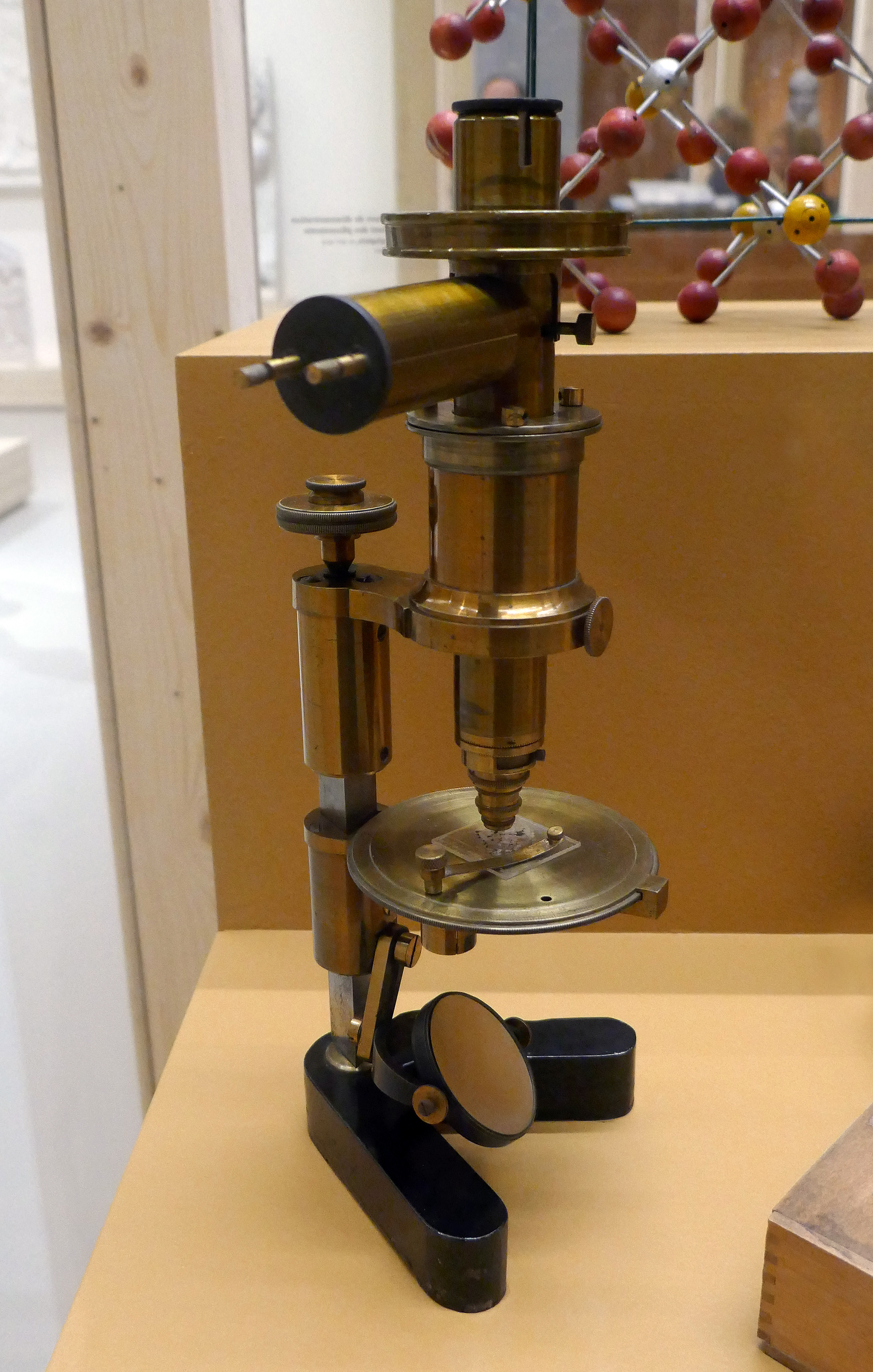 Rudolf Fuess (fabricant). Microscope métallographique de type Rosenbusch, Berlin, vers 1890. Laiton, verre. Collection du Musée de Minéralogie de Strasbourg. Exposition Laboratoire d'Europe Strasbourg, 1880-1930 au Musée d'art moderne et contemporain de Strasbourg.